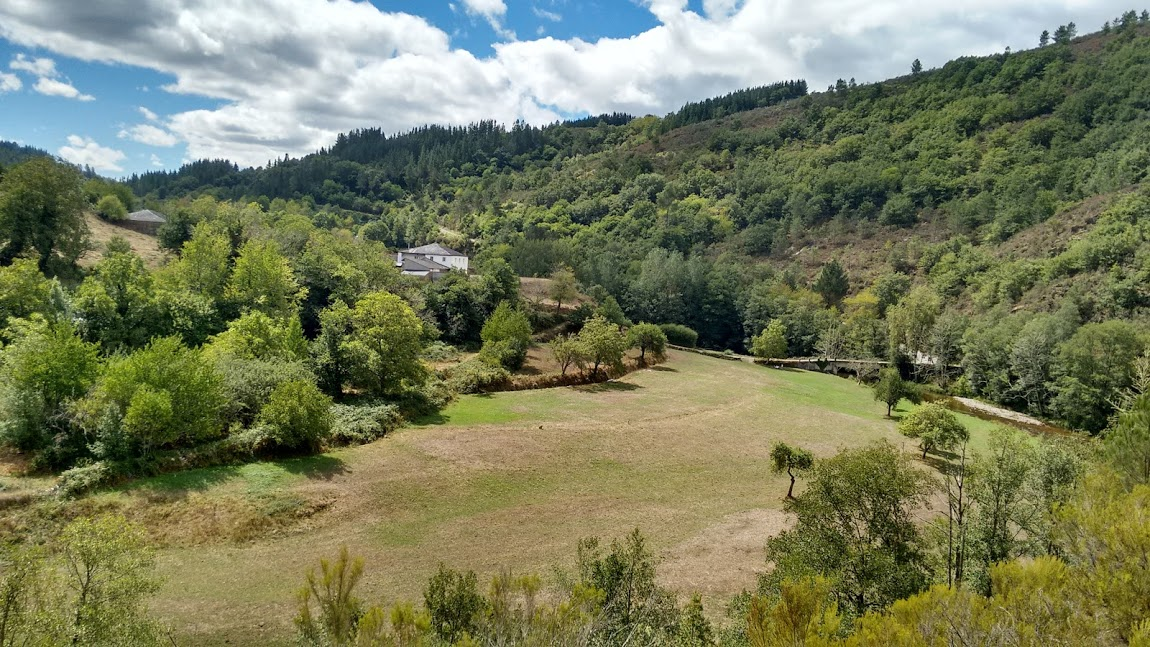 Lugar de Cabana. Parroquia da Ribeira. Concello de Cervantes